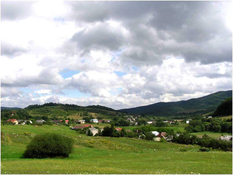 Celkový pohľad